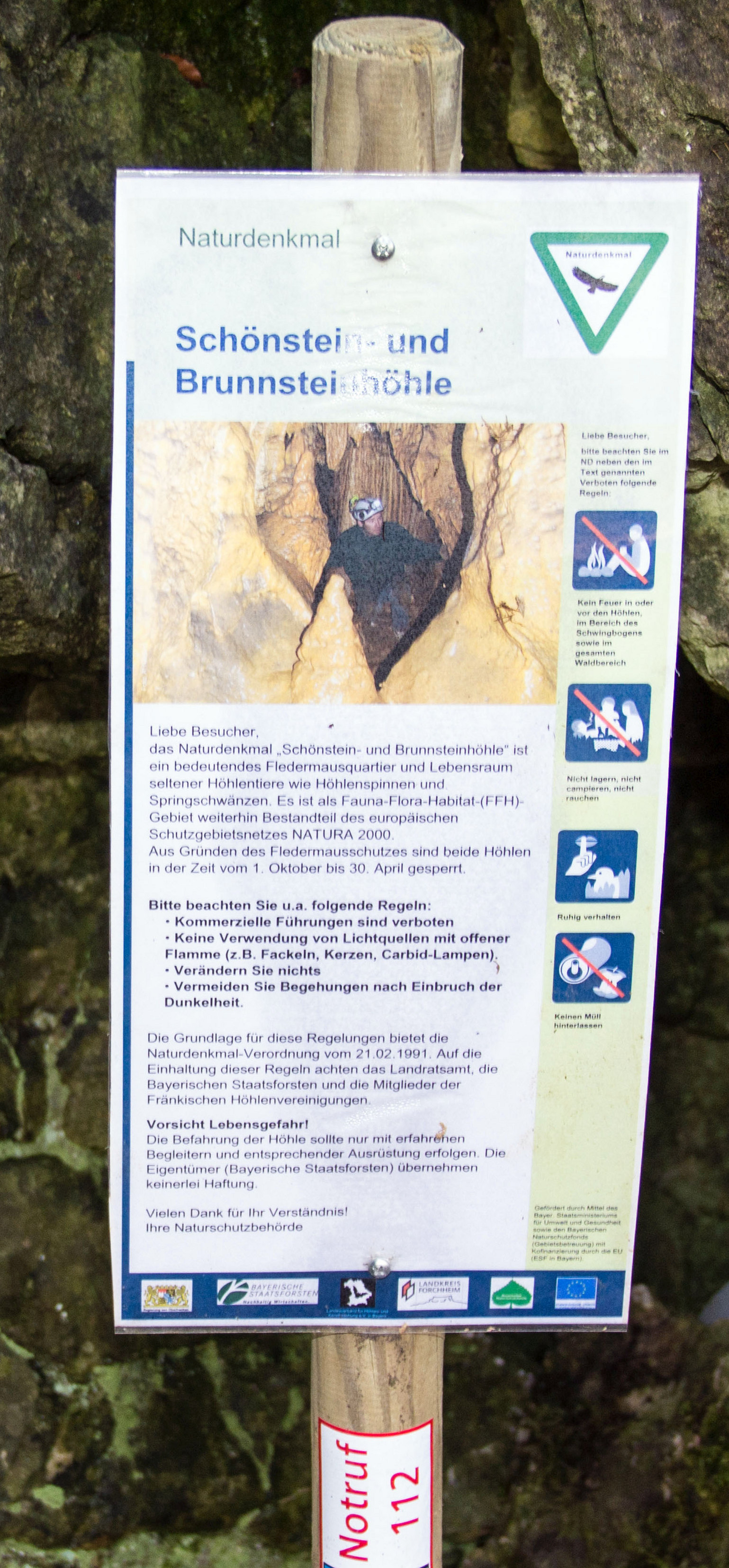 Schönsteinhöhle, Infoschild